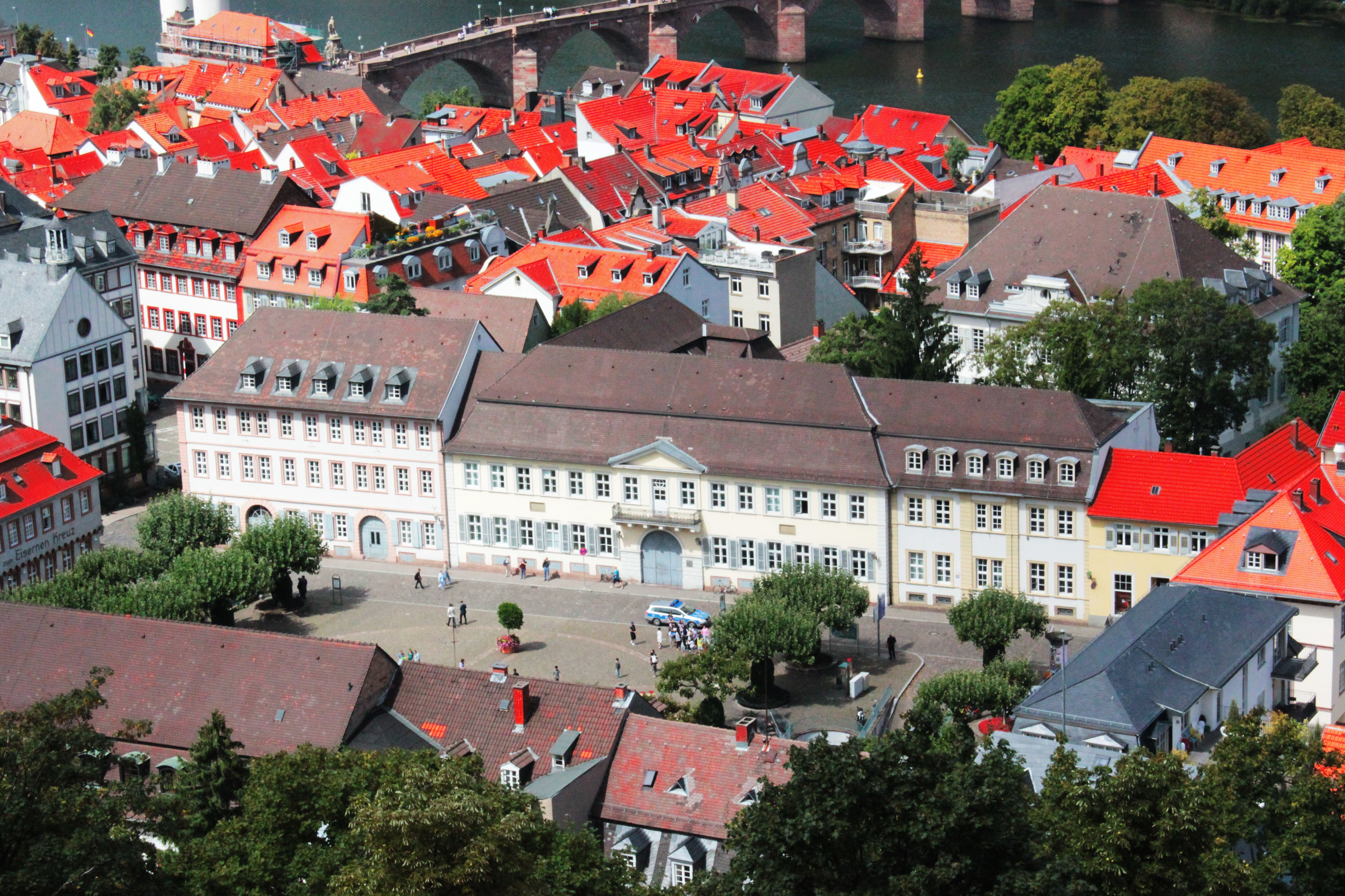 Heidelberg Hauptstraße 207